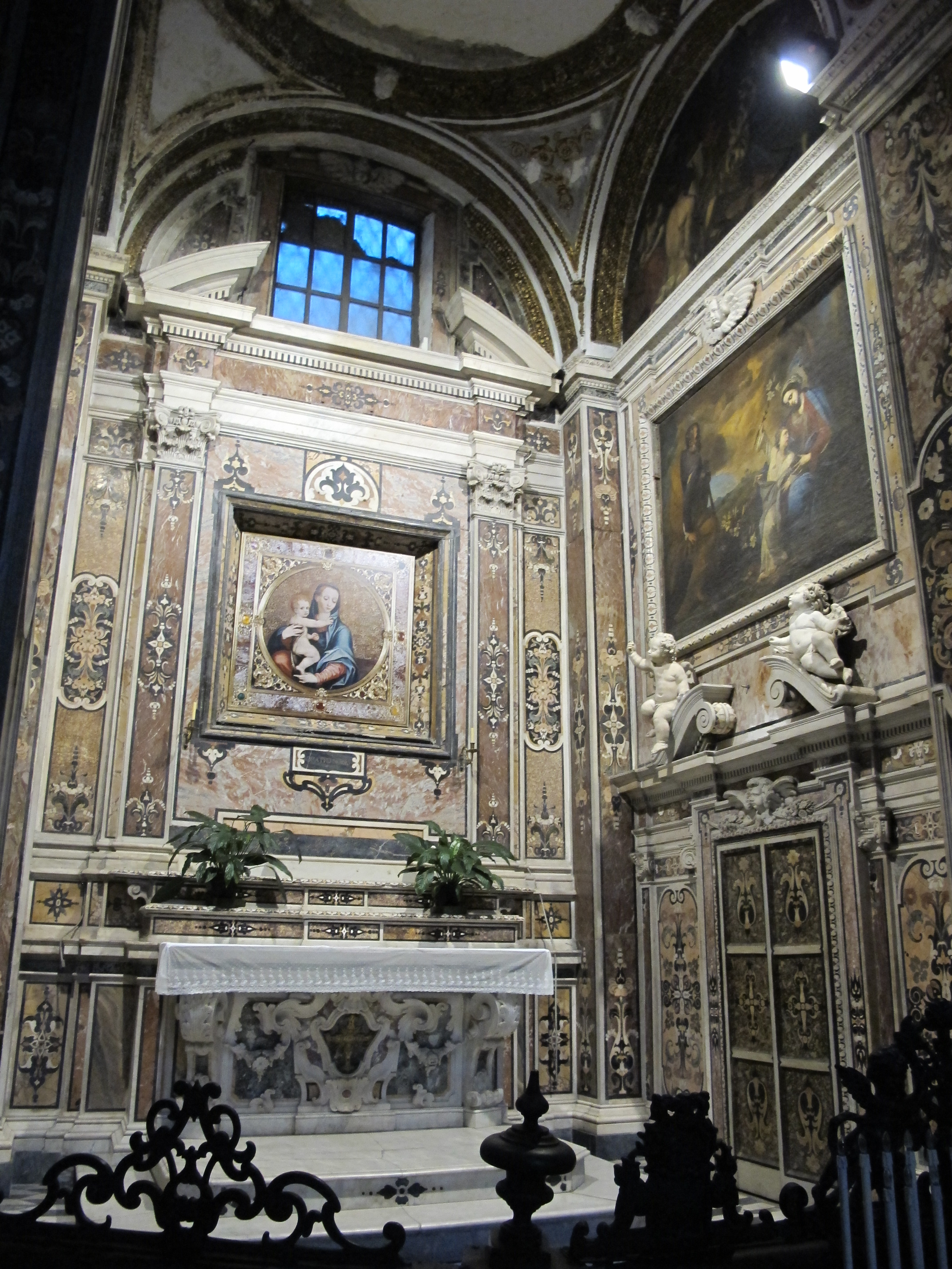 Napoli